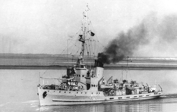 País: España Fecha botadura: 15 de septiembre de 1943. Fecha alta: 25 de abril de 1946. Fecha baja: 11 de febrero de 1973. Desplazamiento ( toneladas ): 615. Dimensiones ( metros ): 61,9 x 8,5 x 2,26 Propulsión: ? ( 2.400 cv ). Velocidad ( nudos ): 16,5. Autonomía ( millas ): 3.000. Dotación: 80. Cañones: 1 x 105mm, 1 x 37mm, 2 x 20mm. Comentario: Ex - DM1. Fue el primero de una serie de dragaminas, construida en los años cuarenta en base a planos del tipo DG.41 de diseño alemán, usando carbón de combustible, en los años sesenta fue destinado para misiones de vigilancia pesquera, marítima y servicios auxiliares por ejemplo avituallamiento del Faro de la isla de Alborán, entre otros. Con base en el Arsenal de La Carraca, San Fernando (Cádiz).